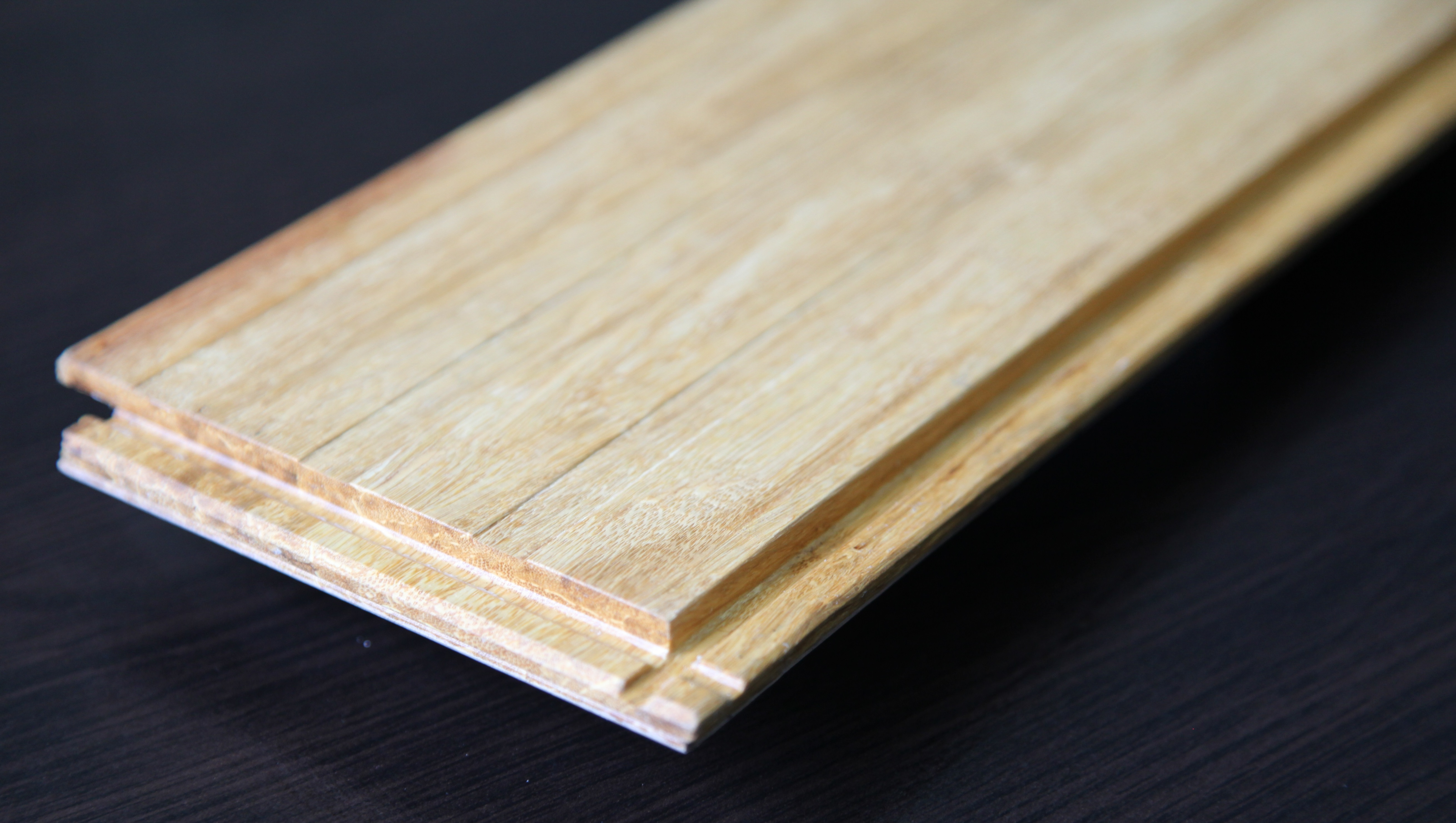 Бамбук прессованный: обратная сторона. Видно замковое соединение и неглубокие продыхи.